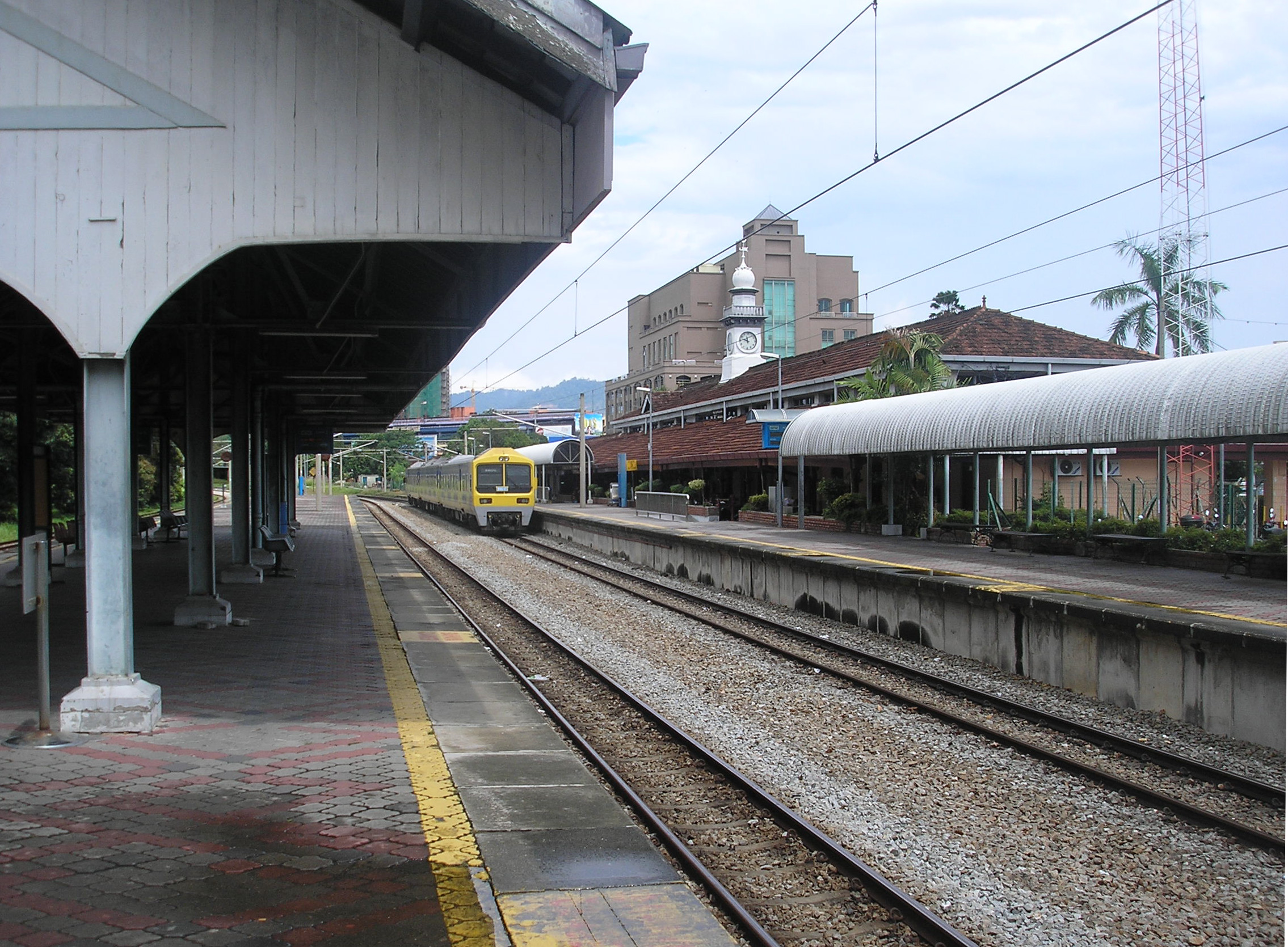 The Seremban railway station (Rawang-Seremban) (platform view) Seremban, Negeri Sembilan, Malaysia.